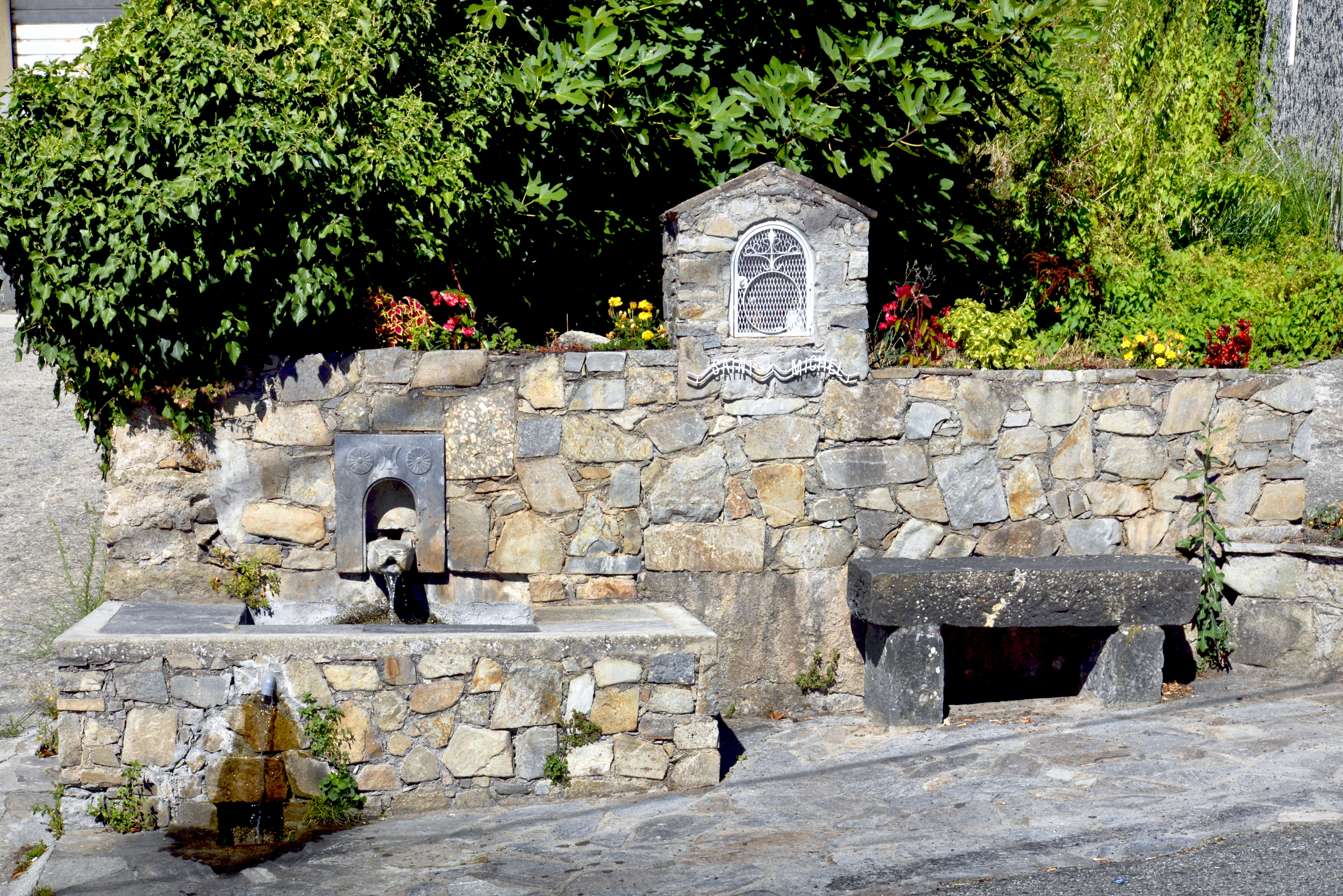 Venaco, Centre Corse (Haute-Corse) - Fontaine Saint-Michel, du nom du saint patron de la commune.